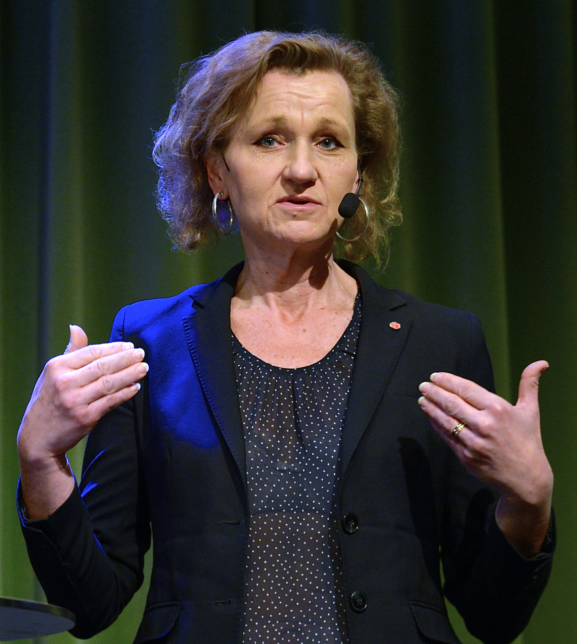 Boel Godner i en debatt om flyktingmottagande och migrationspolitik på Kulturhuset Stadsteatern den 10 december 2014.